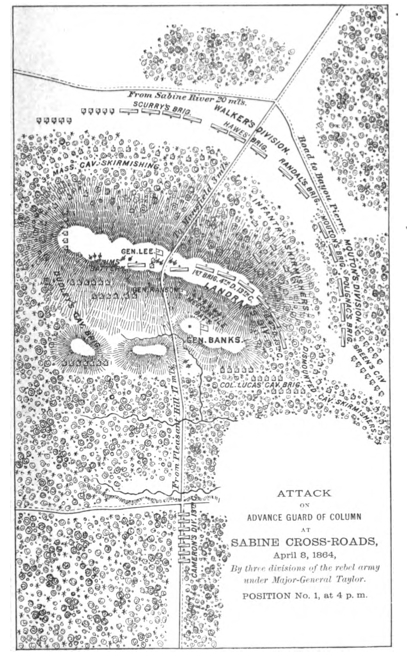 Map attached to Official Report of General Banks